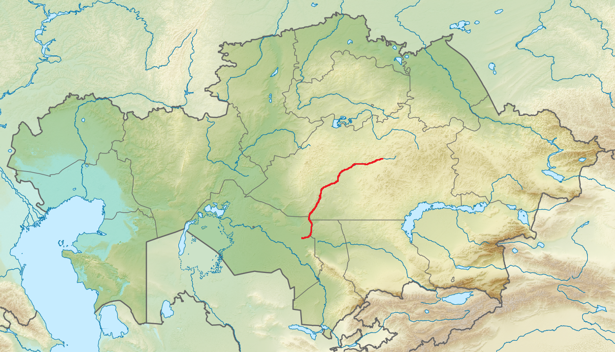 Река Сарысу